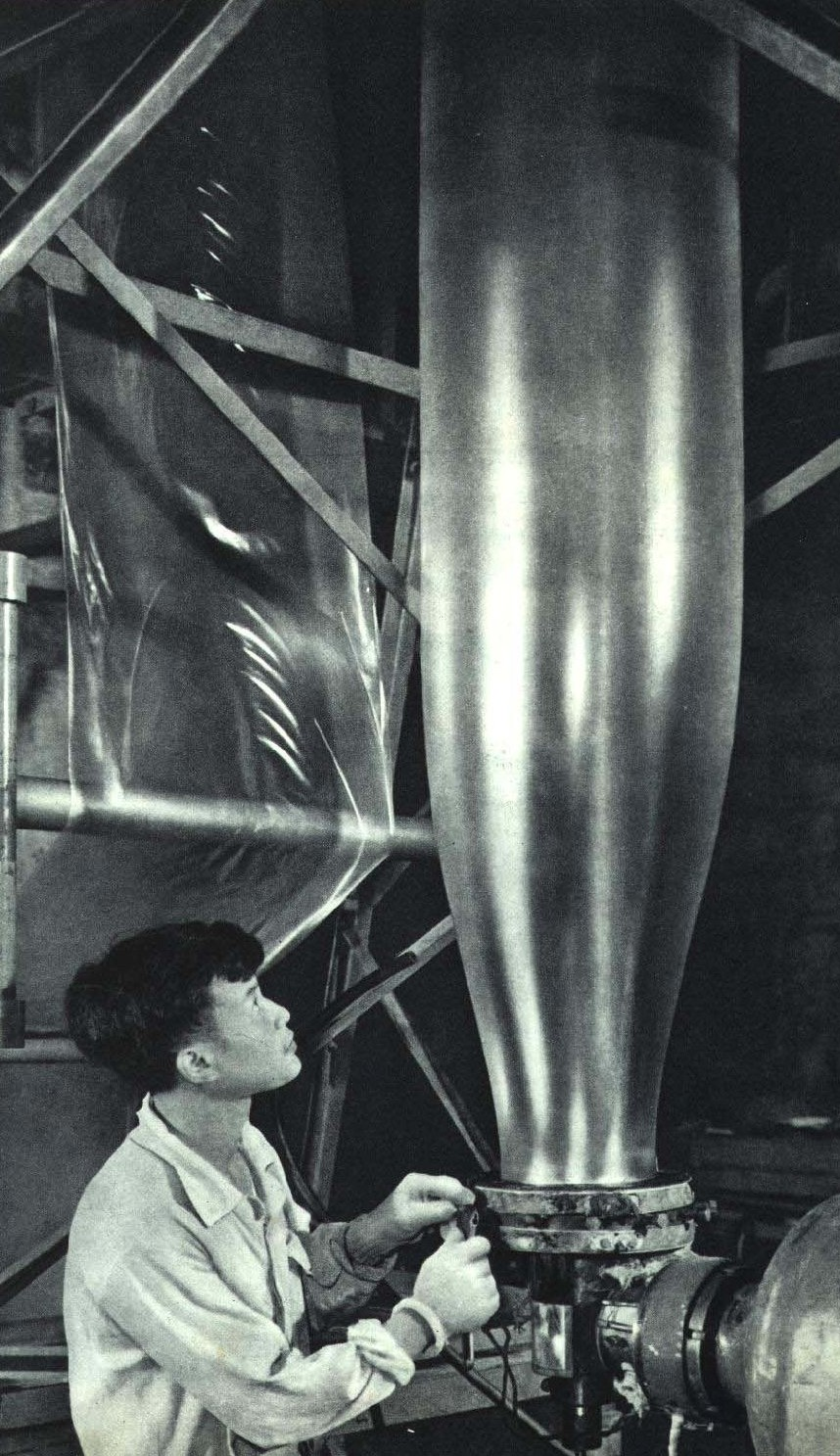 1964-03 1964年 上海化工厂制造聚氯乙烯薄膜